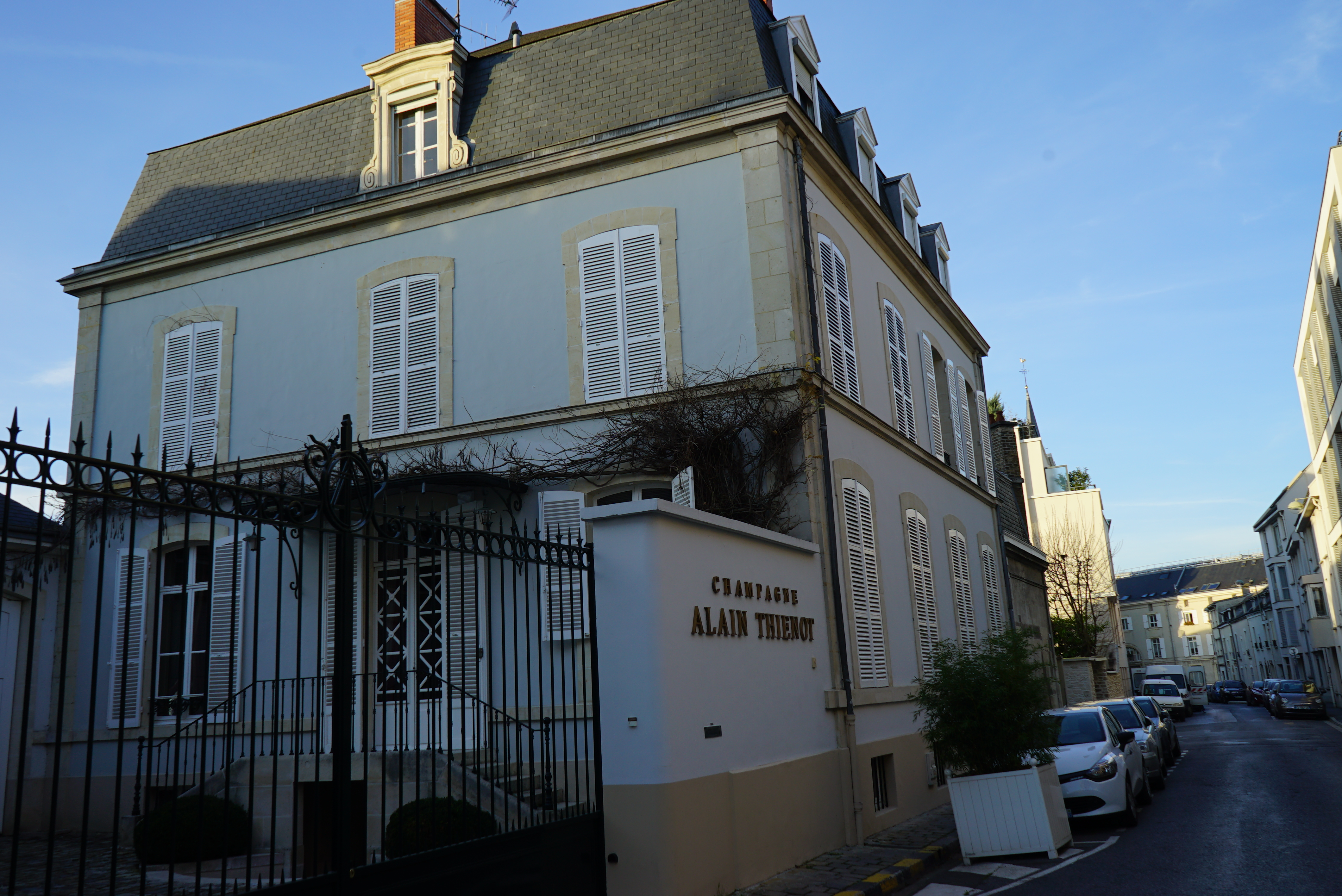 vue de la rue des Moissons.